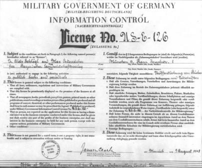 BLV Lizenz